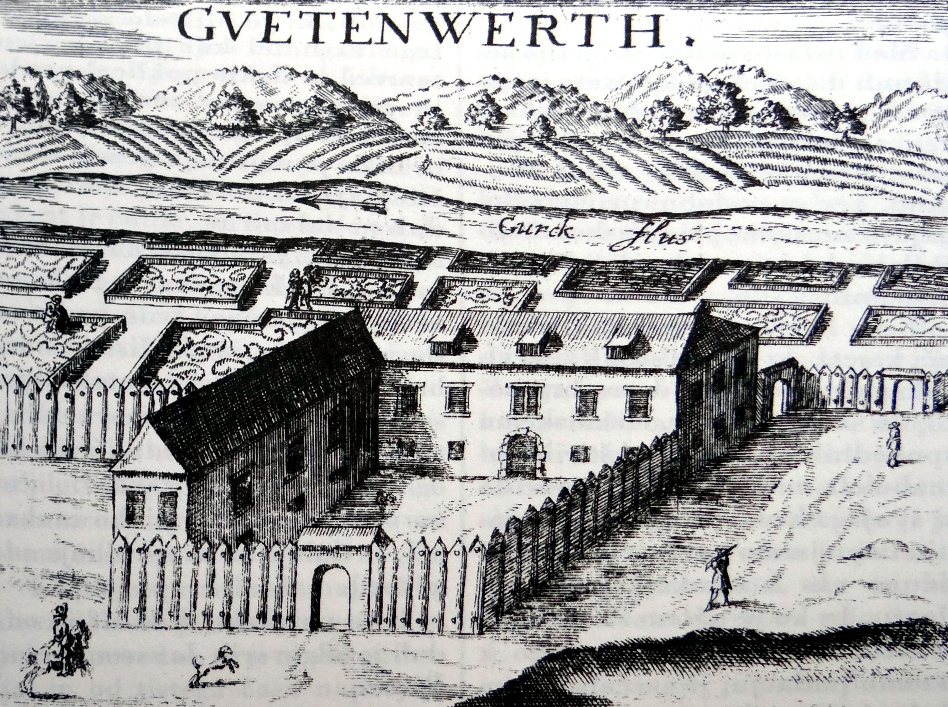 Dvor Otok (Gutenwerde)